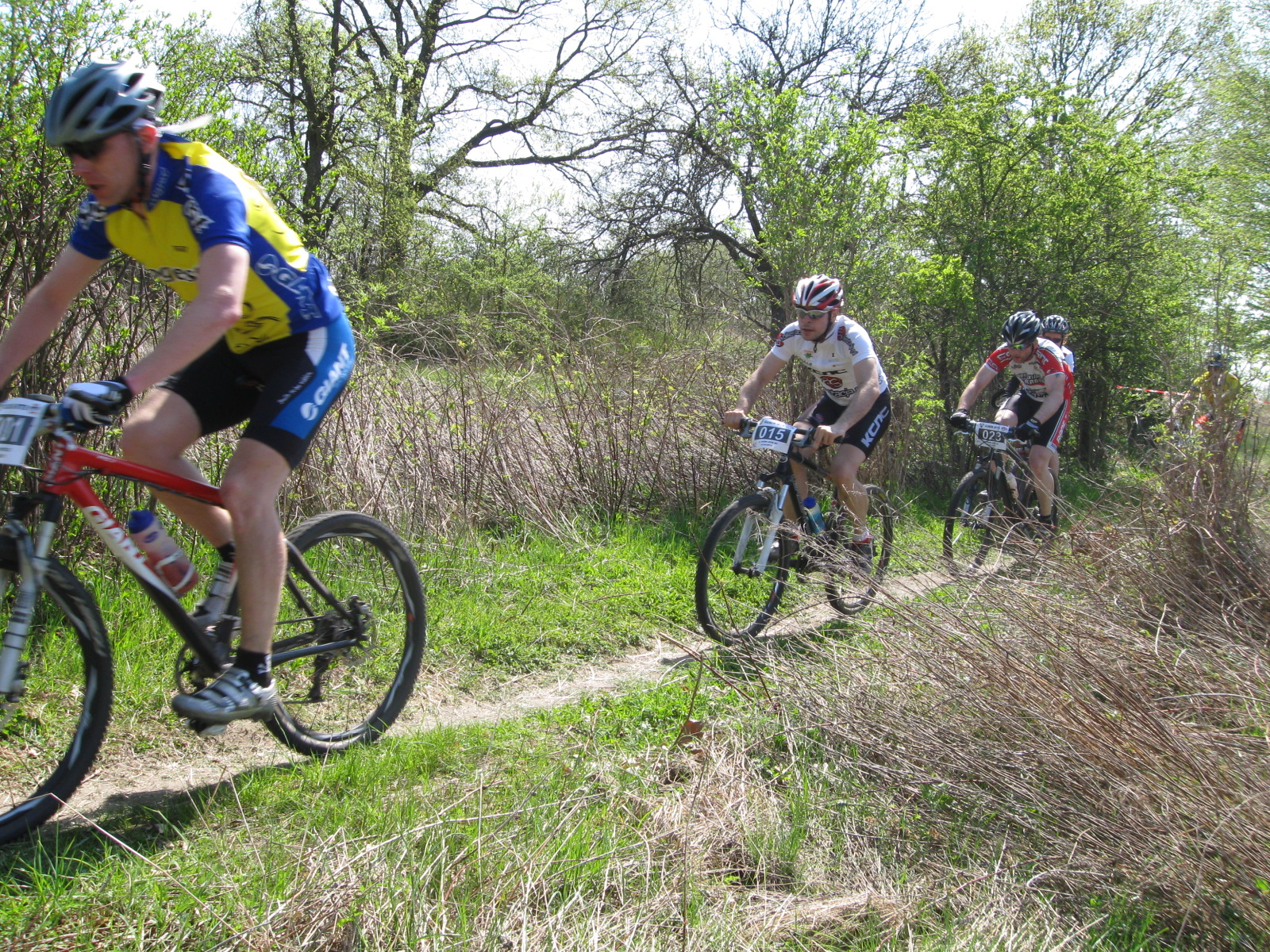 Zawodnicy ścigający się na starcie II Wyścigu Gubin MTB, który miał miejsce 25 kwietnia 2010 na Wzgórzach Gubińskich.